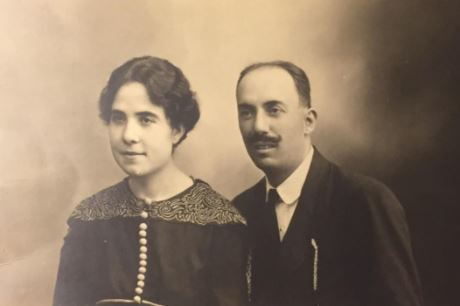 Antonia Alfaro i el seu marit, 1917